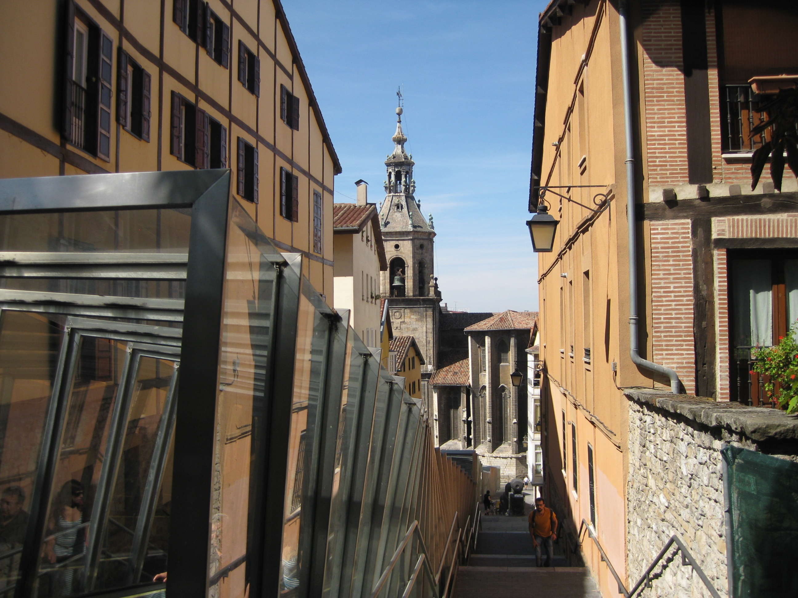 Rampas mecánicas en el cantón de la Soledad en el casco medieval de Vitoria. Al fondo, iglesia de San Pedro Apóstol.